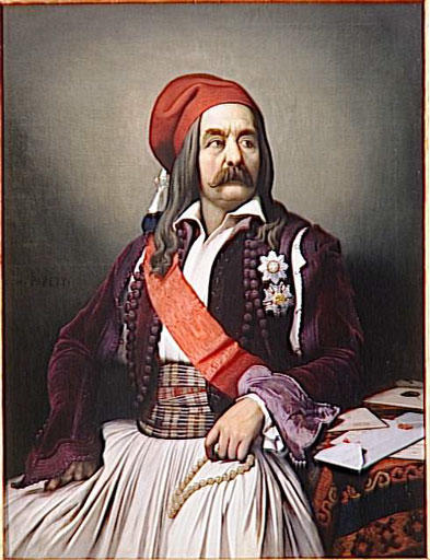 Artist Dominique Papety (1815–1849) DescriptionFrench painter and illustratorDate of birth/death 12 August 1815 19 December 1849Location of birth/death Marseille MarseilleWork location Rome (1836–1841)Authority control : Q3035378 VIAF: 69154230 ISNI: 0000 0000 6658 7626 ULAN: 500030678 LCCN: nr97034907 GND: 117742252 WorldCat creator QS:P170,Q3035378Title Jean KolettiMedium huile sur toileDimensions Height: 117 cm (46 in); Width: 90 cm (35.4 in) dimensions QS:P2048,117U174728;P2049,90U174728Current location Palace of Versailles Native nameChâteau de VersaillesParent institutionVersailles domainLocationChâteau de VersaillesPlace d'Armes78000 Versailles, Yvelines FranceCoordinates48° 48′ 17.3″ N, 2° 07′ 13.2″ E Establishedfrom 1624 until 1790 date QS:P,+1500-00-00T00:00:00Z/6,P580,+1624-00-00T00:00:00Z/9,P582,+1790-00-00T00:00:00Z/9: built 1837: opened to publicWeb pageen.chateauversailles.frAuthority control : Q2946 VIAF: 127977992 ISNI: 0000 0004 1794 9458 ULAN: 500312482 LCCN: n91058220 NAID: 10038353 WorldCat institution QS:P195,Q2946 Source/Photographer Joconde database: entry 000PE011991Permission(Reusing this file) This work is in the public domain in its country of origin and other countries and areas where the copyright term is the author's life plus 100 years or less. You must also include a United States public domain tag to indicate why this work is in the public domain in the United States. This file has been identified as being free of known restrictions under copyright law, including all related and neighboring rights.